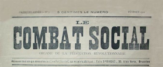 En 1910, la Fédération Révolutionnaire publie le journal Le Combat Social, dont le premier numéro parait sous le titre de Bulletin de la Fédération Révolutionnaire. Le responsable (membre délégué) est Félix Springael